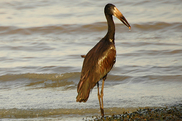 Uganda African Openbill (Anastomus lamelligerus) Entebbe, Uganda